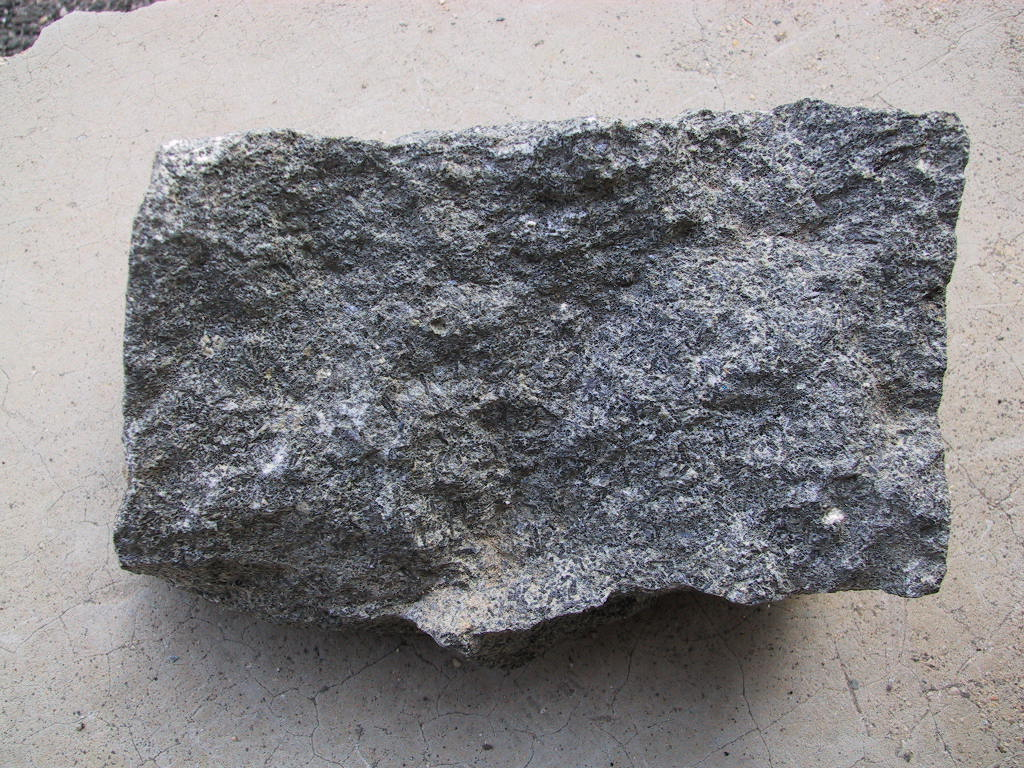 Spessartite (da un filone a sud di Olbia)